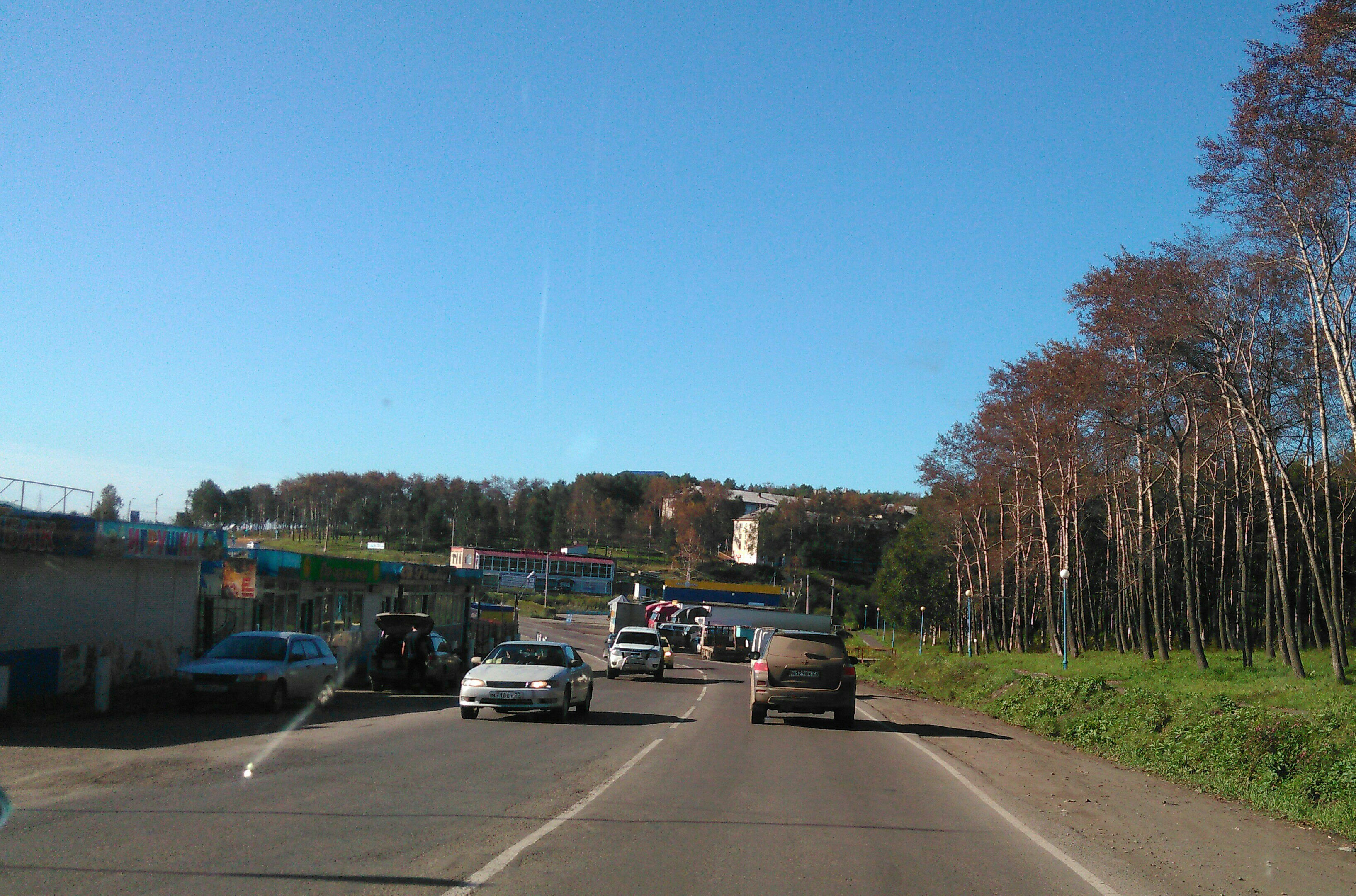 Ул. Железнодорожная (напротив рынка)